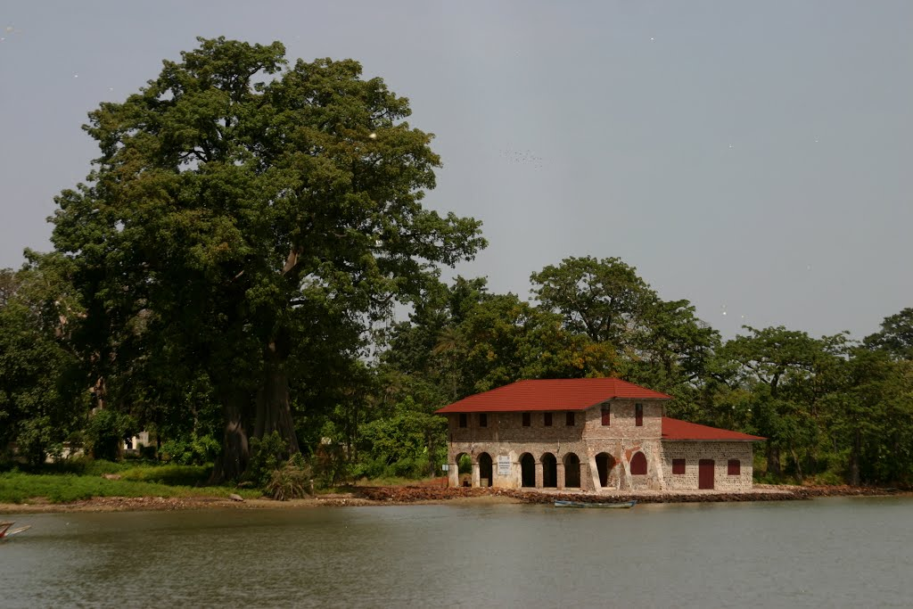 Находится на берегу р.Гамбия